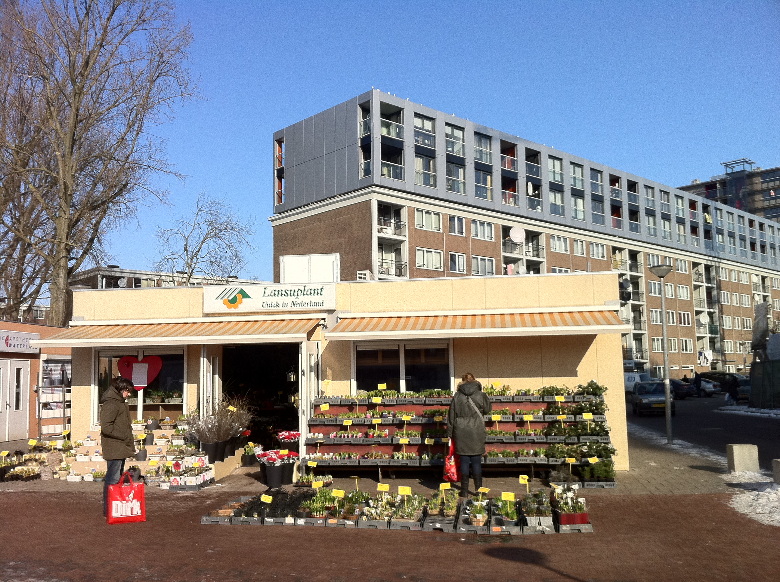 Amsterdam-Noord, tijdelijk winkelcentrum Waterlandplein.